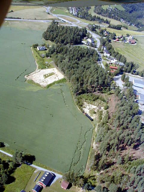 Gravfeltet på Veien (Veien Kulturminnepark)